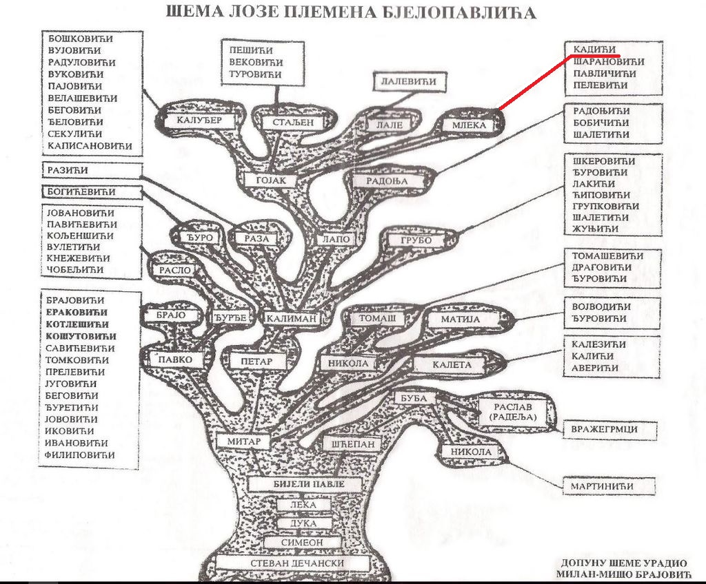 Родослов